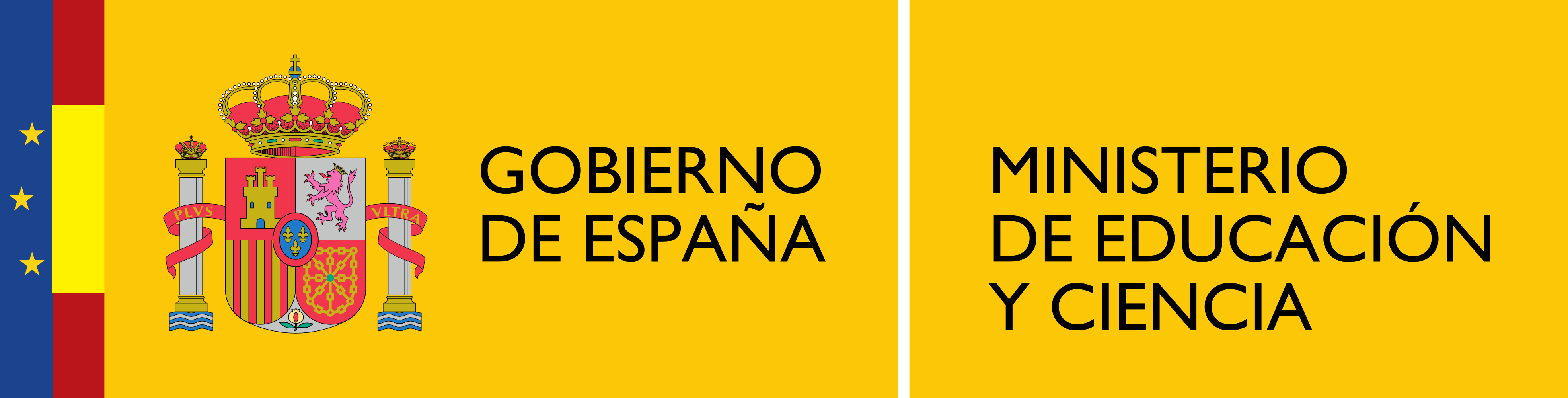 Logotipo del Ministerio de Educación y Ciencia